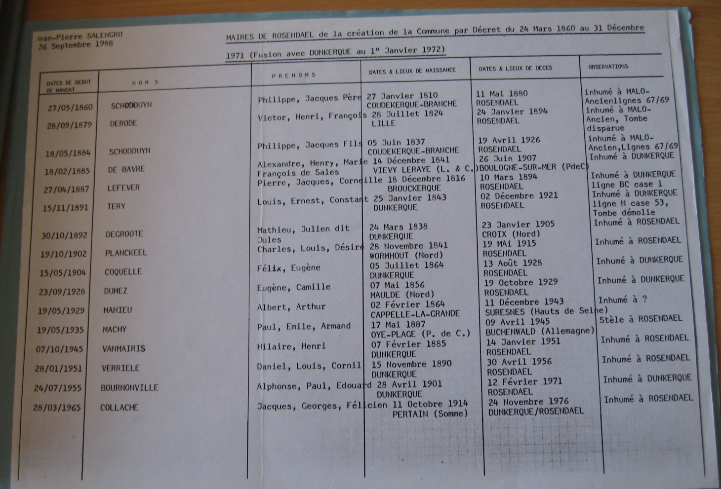 LISTE DES MAIRES DE ROSENDAËL (Nord) de 1860 à 1972